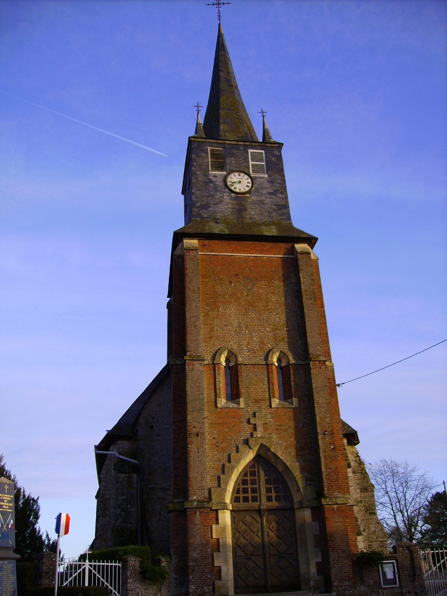 Église de Saint-Pierre-de-Cormeilles. Église du XIIIe. Church of Saint-Pierre-de-Cormeilles.